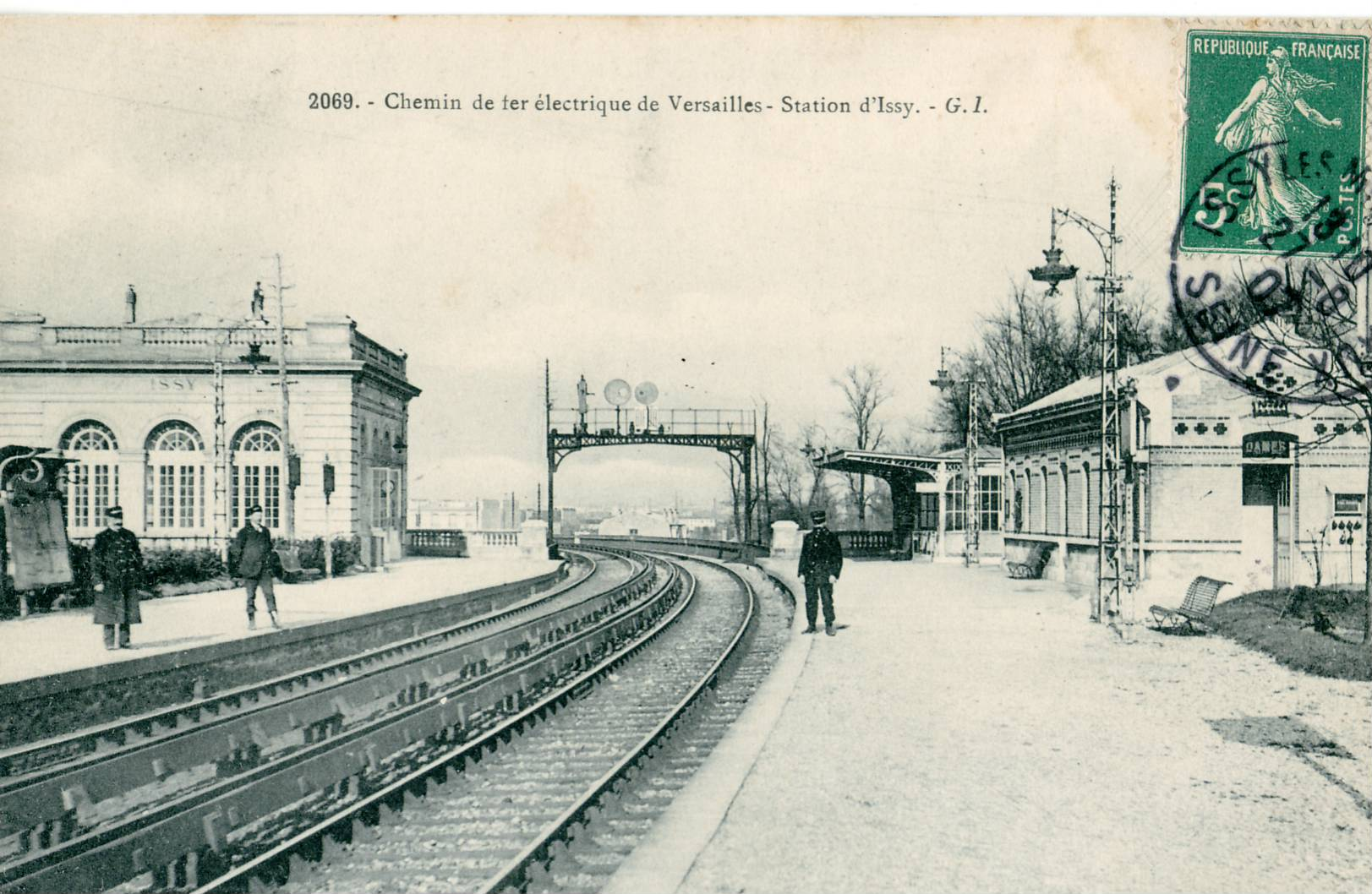 Carte postale ancienne éditée par GI N°2069 Chemin de fer électrique de Versailles - Station d'Issy On distingue clairement le troisième rail d'alimentation électrique